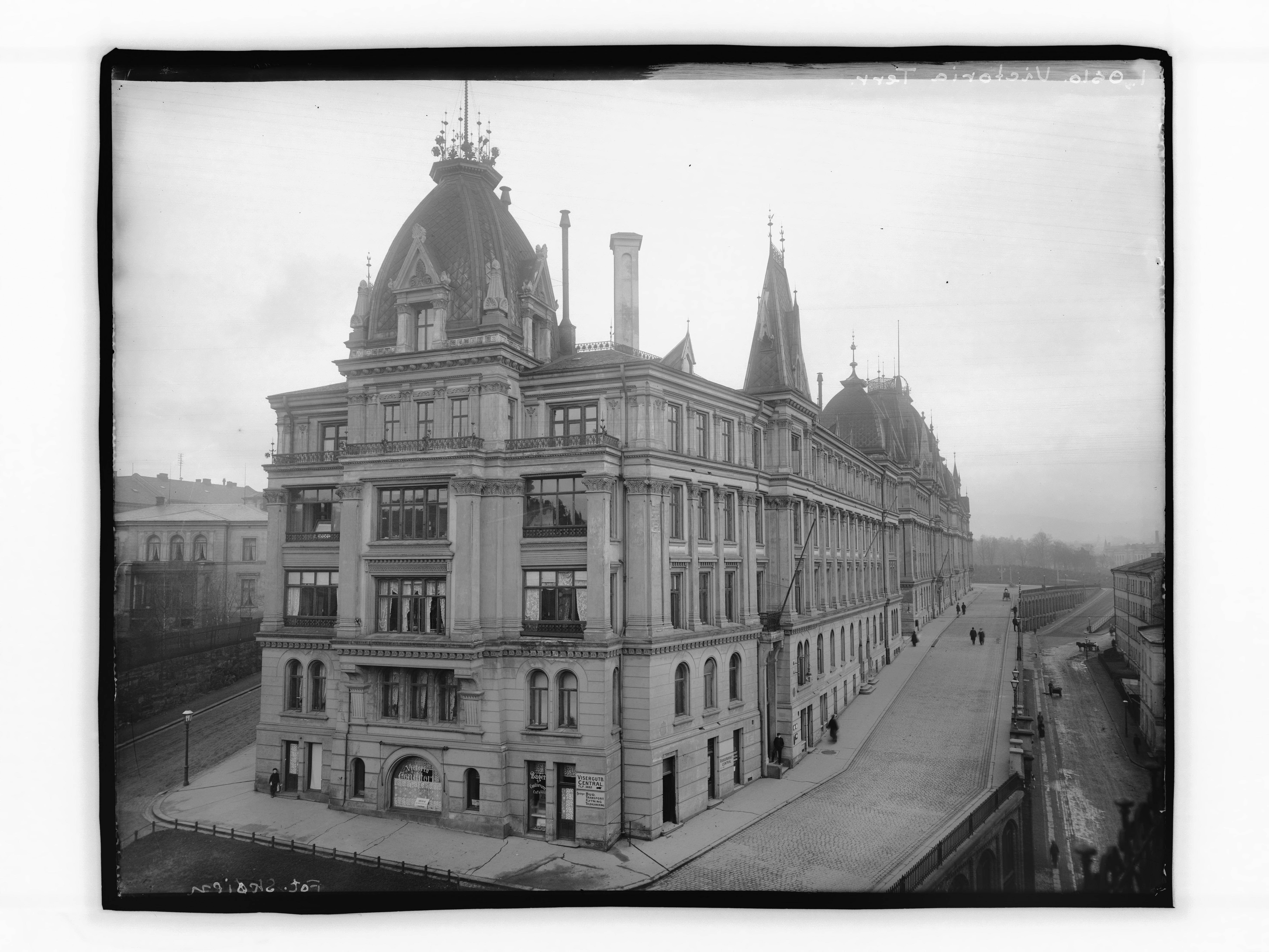 Påskrift negativ: 1. Oslo. Victoria Terr Fot.Skøien [Riksantikvaren] Påskrift konvolutt: B-1 Oslo. Victoria terasse [Riksantikvaren] Sted: Sentrum Kommune: Oslo Fylke: Oslo Tagger: Victoria terrasse fasade